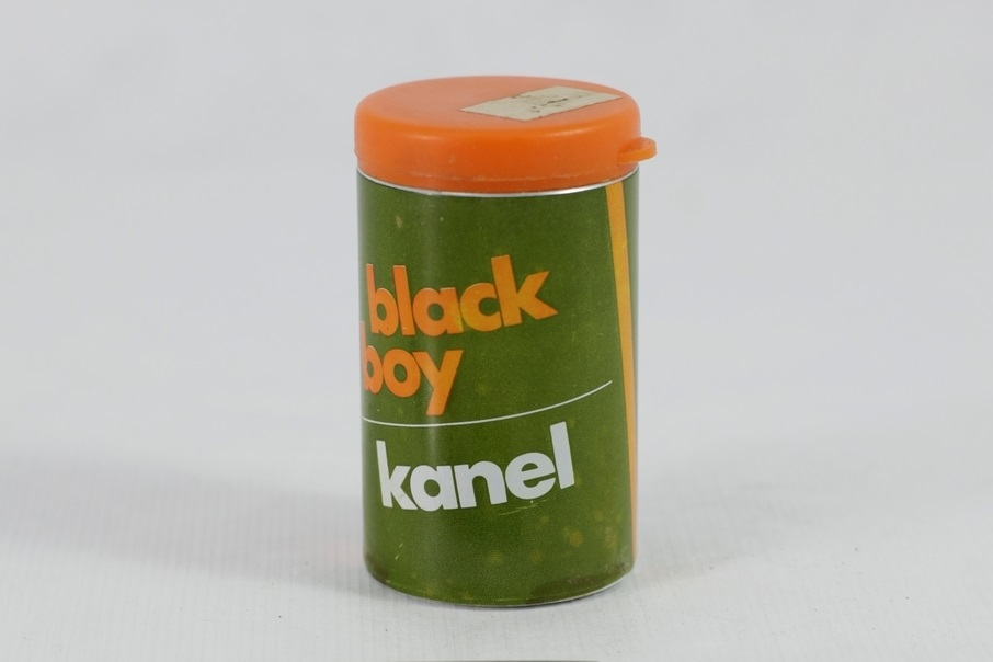 Black Boy kanel, produsert ca. 1952 - 1969.